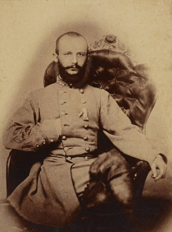 General Stephen Dodson Ramseur (CSA)